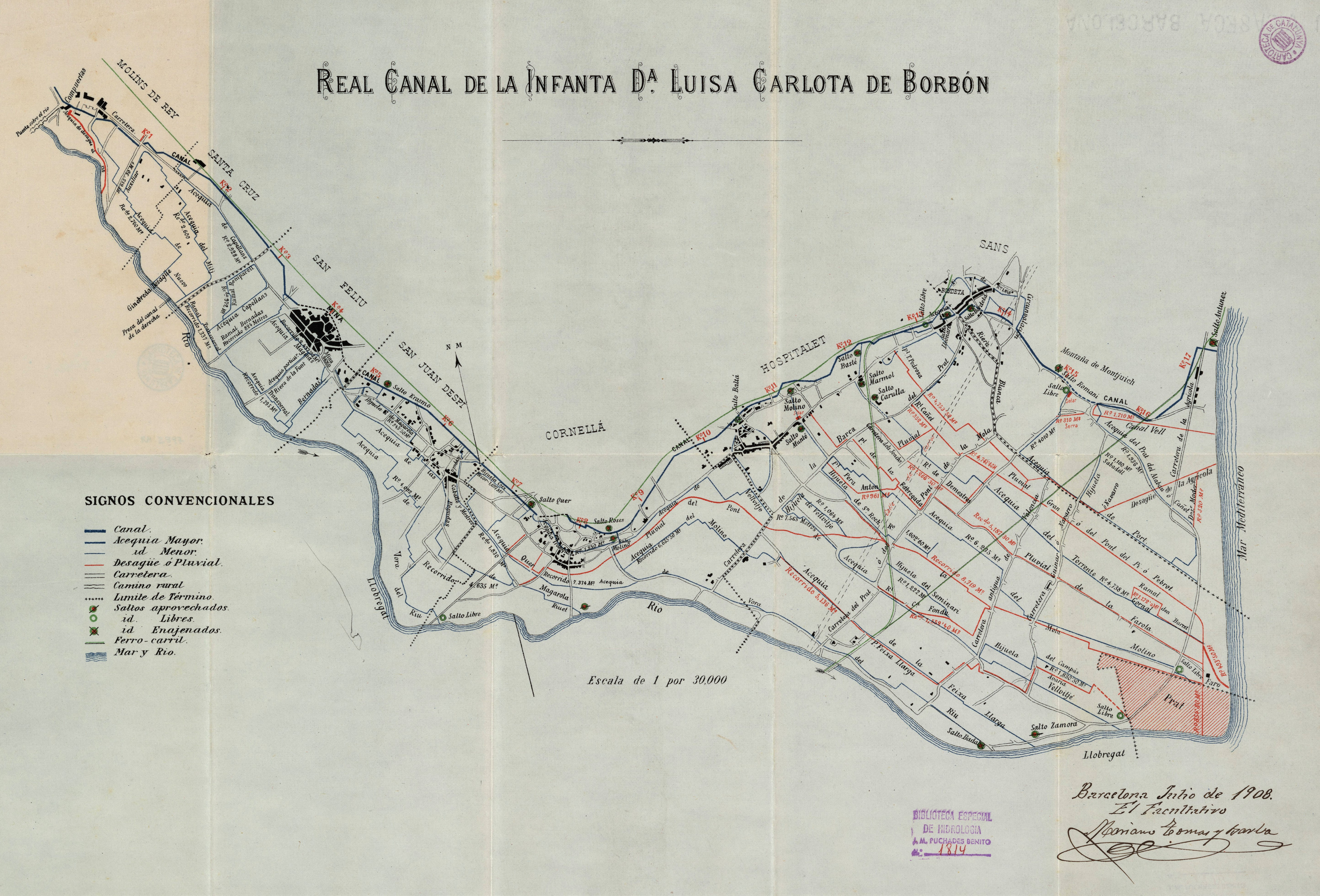 Mapa de 1908 amb el detall del traçat del Canal de la Infanta per Molins de Rei, Sant Feliu de Llobregat, Sant Joan Despí, Cornellà de Llobregat, l'Hospitalet de Llobregat i la Marina de Sants-Barcelona i el Prat de Llobregat. Cartoteca de l'Institut Cartogràfic i Geològic de Catalunya